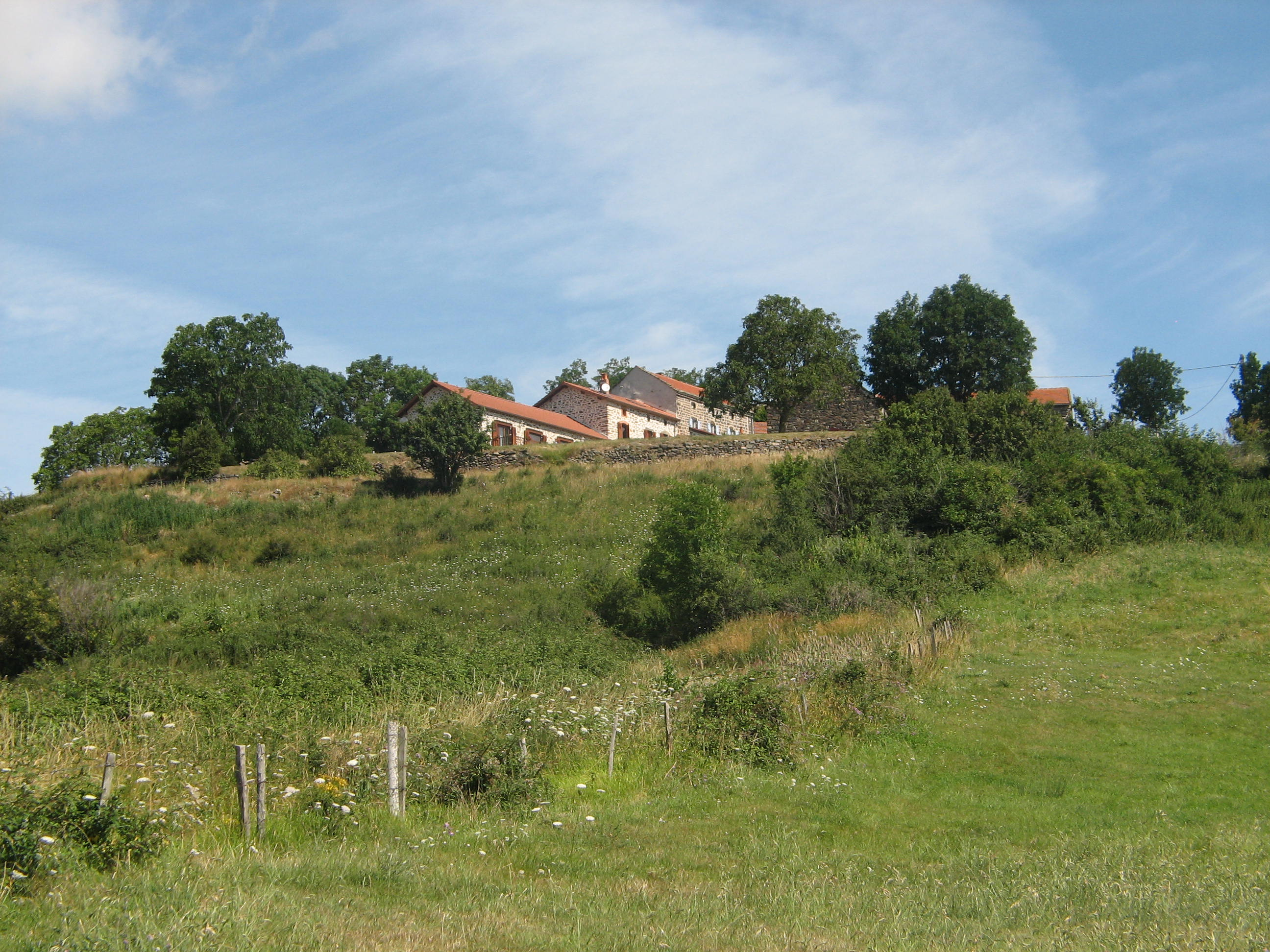 Lagarde (Autrac), Auvergne, France